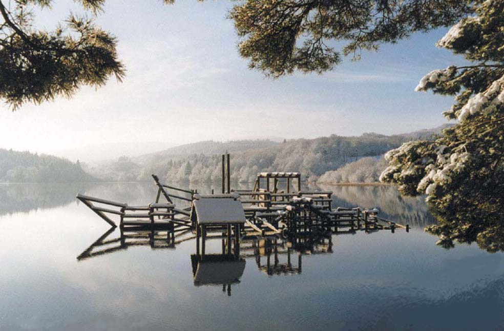 Le lac des Montagnès en hiver. Ce lac artificiel est sur la commune de Mazamet.